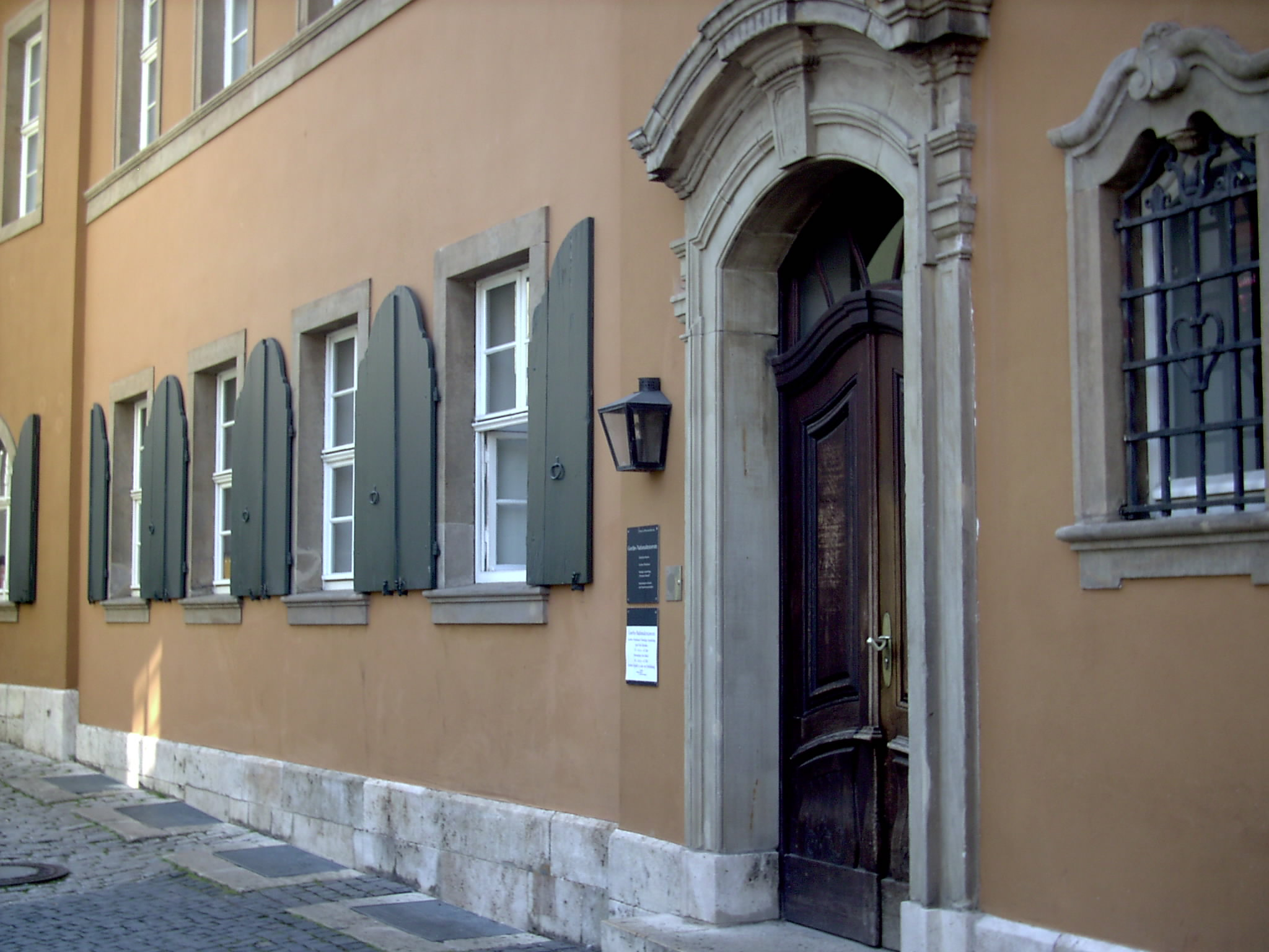 Johann Wolfgang von Goethe's tenement in Weimar